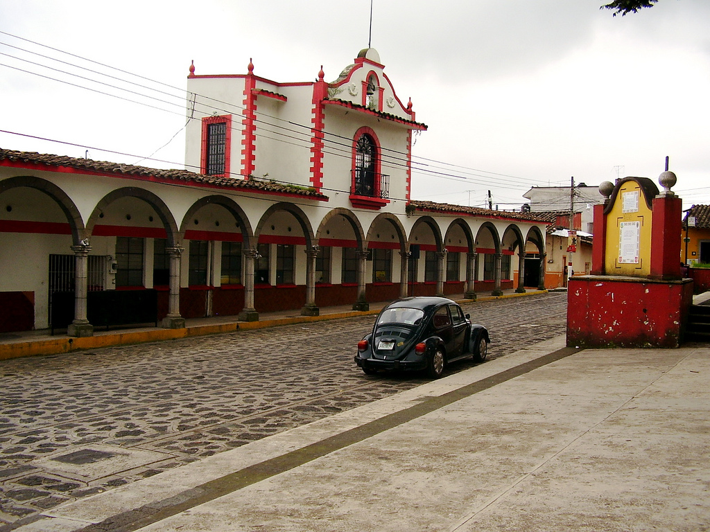 Xico